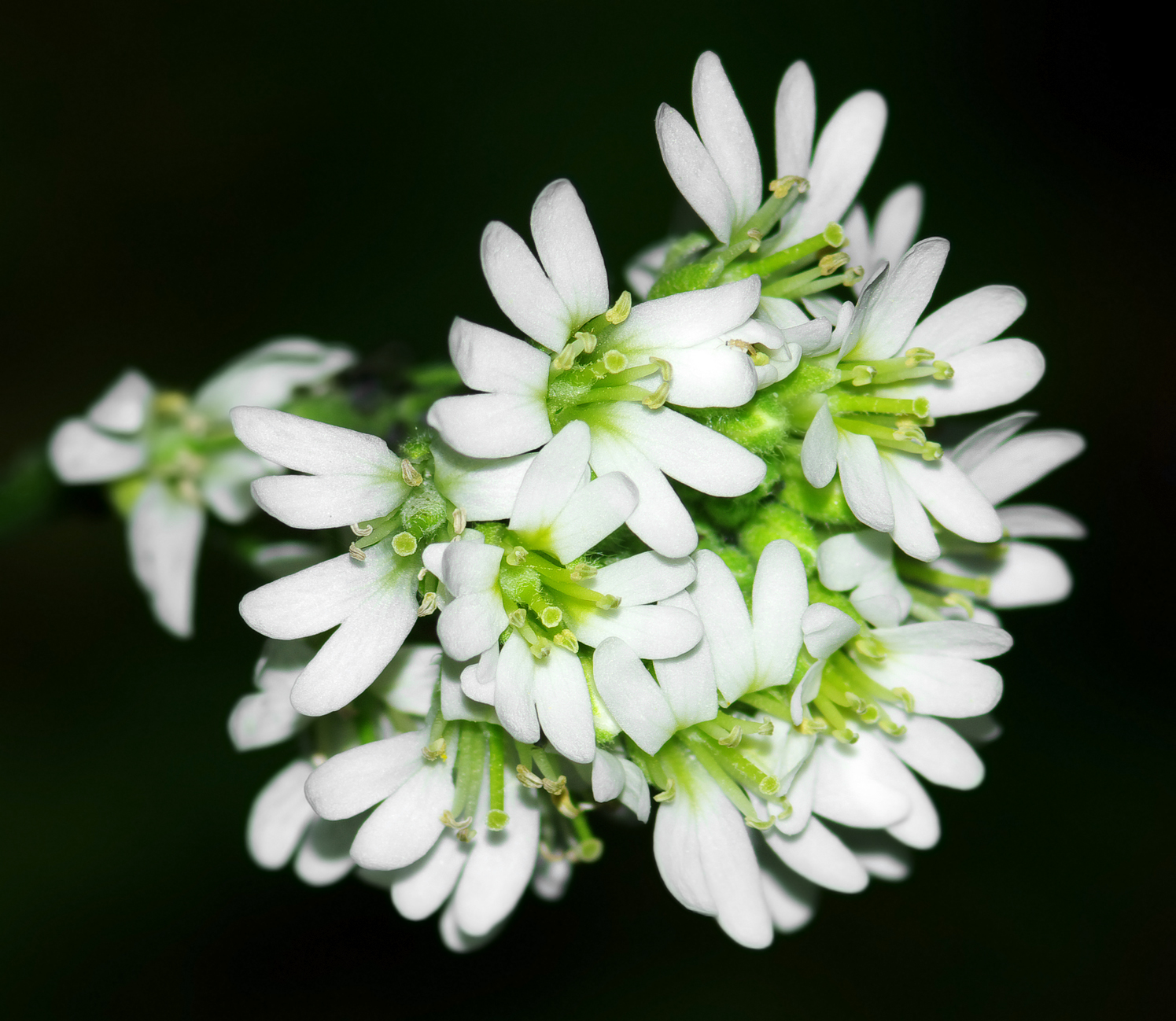 Pyleniec pospolity (Berteroa incana)